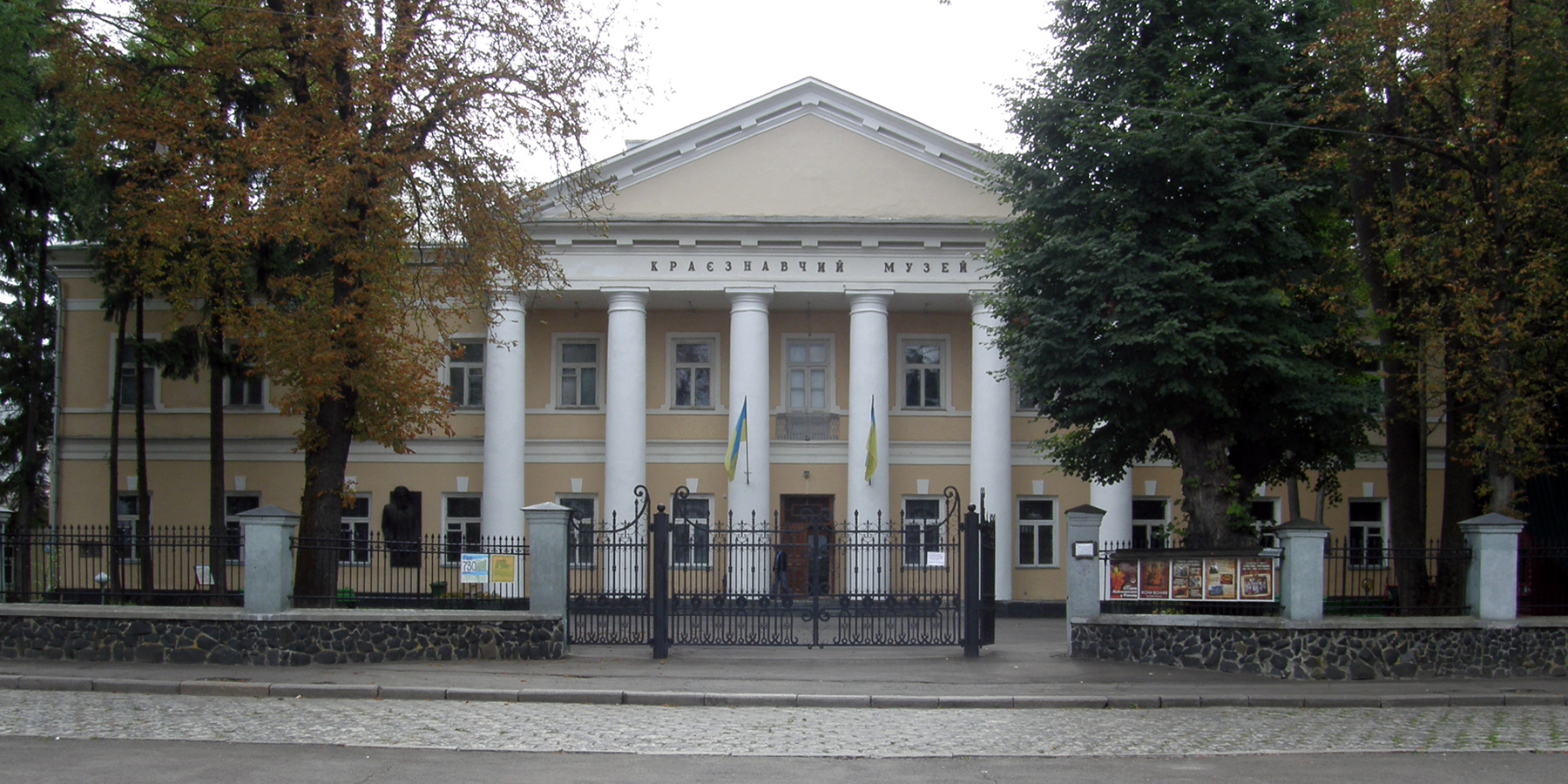 Краеведческий музей в здании бывшей гимназии